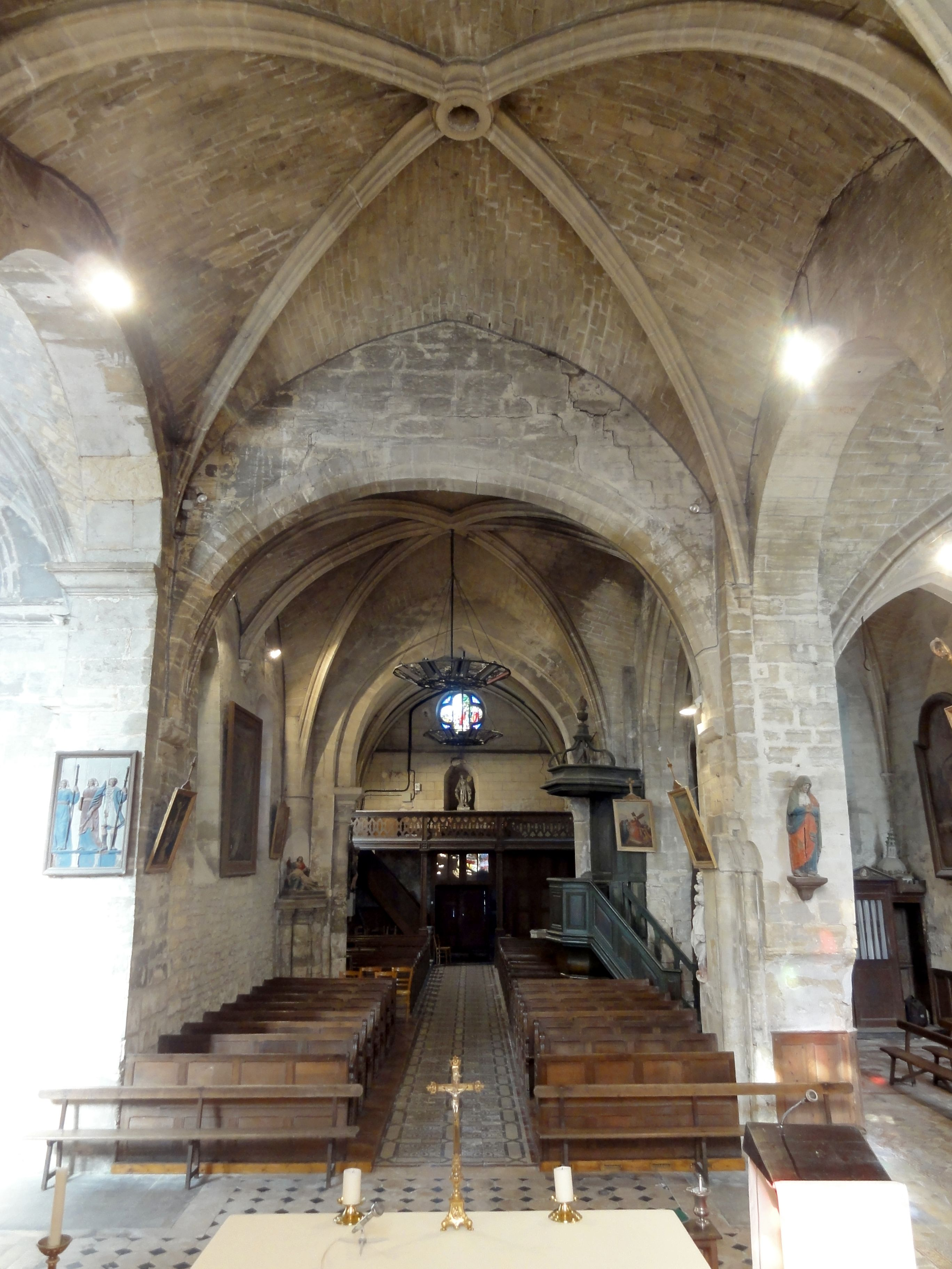 Croisée, vue vers l'ouest.